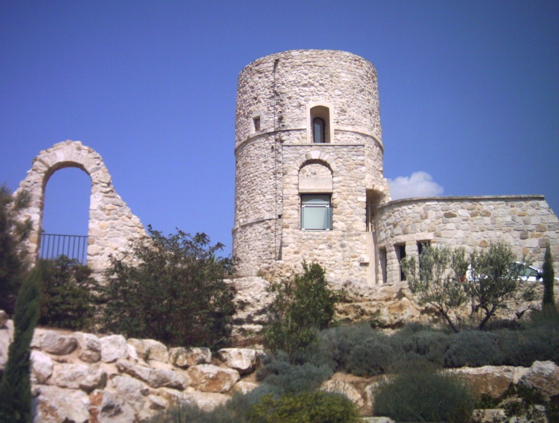 Le site du vieux village de Velaux (view of the old village)